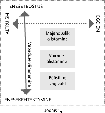 Elitaristliku sotsiaalse korra poolt rakendatavad vabaduse piiramise meetodid paigutatuna vabaduse teljele.